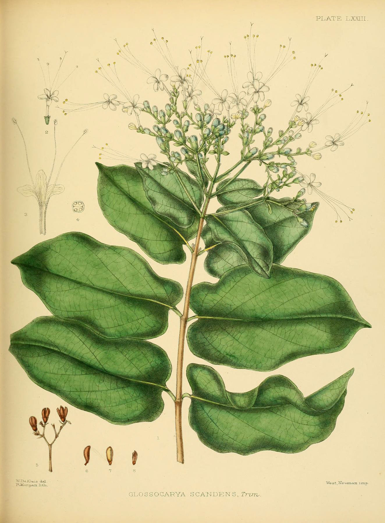 PLATE LXX1II. WDeAlwis dsL. GL S S O CARYA S CAN DENS, Trvru. West^'Tev/mcLn imp.